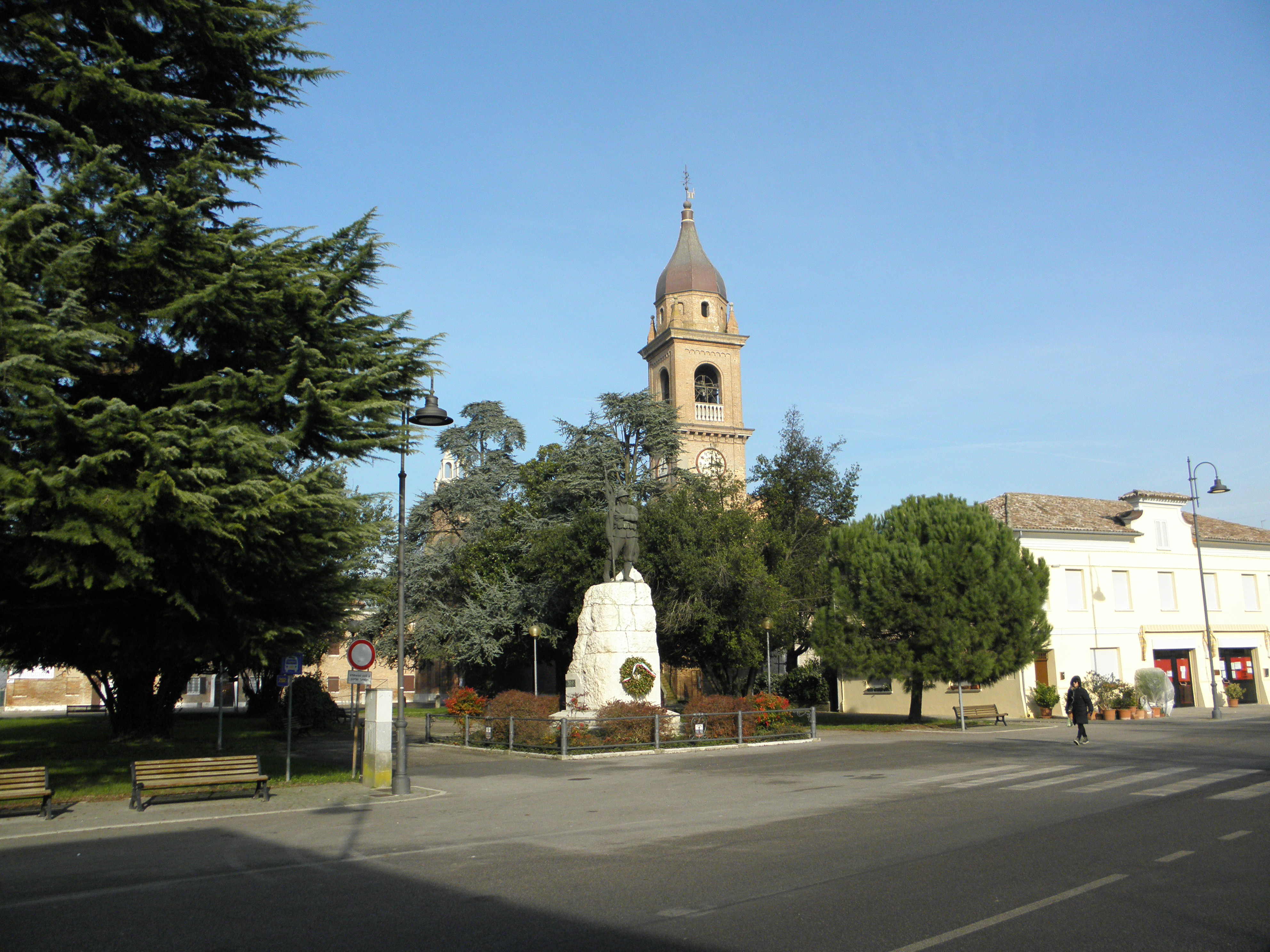 Formignana, piazza IV Novembre con il monumento ai caduti e la sommità del campanile della chiesa parrocchiale di Santo Stefano.